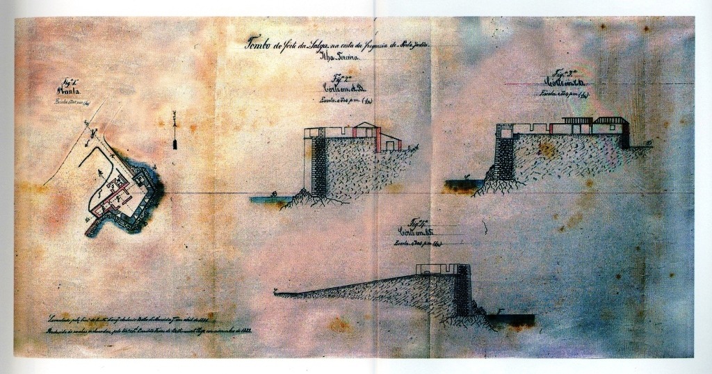 "Tombo do Forte da Salga na costa da freguezia de Porto Judeu", Ilha Terceira (Açores), Portugal.